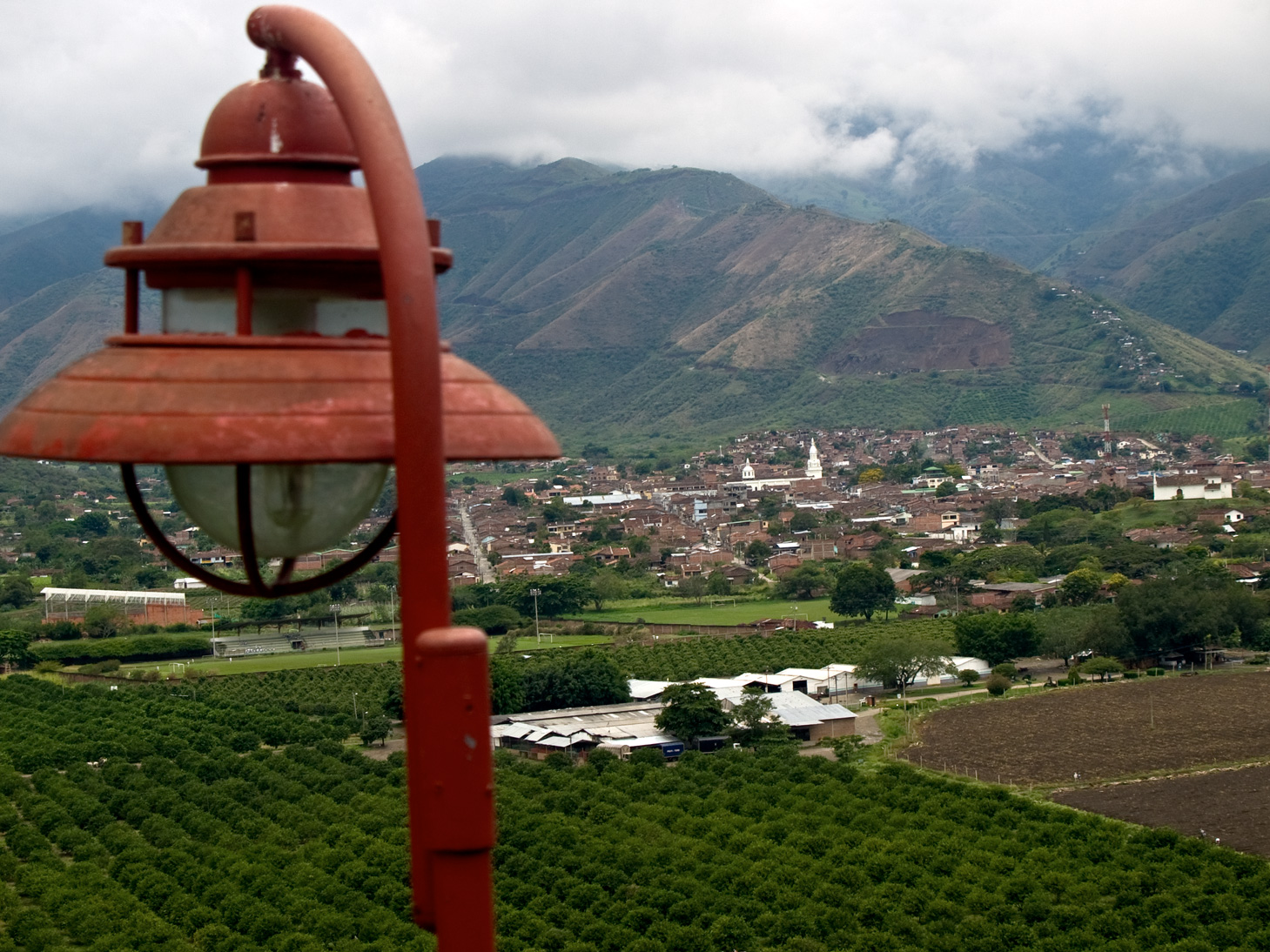 La Unión, Valle del Cauca, Colombia